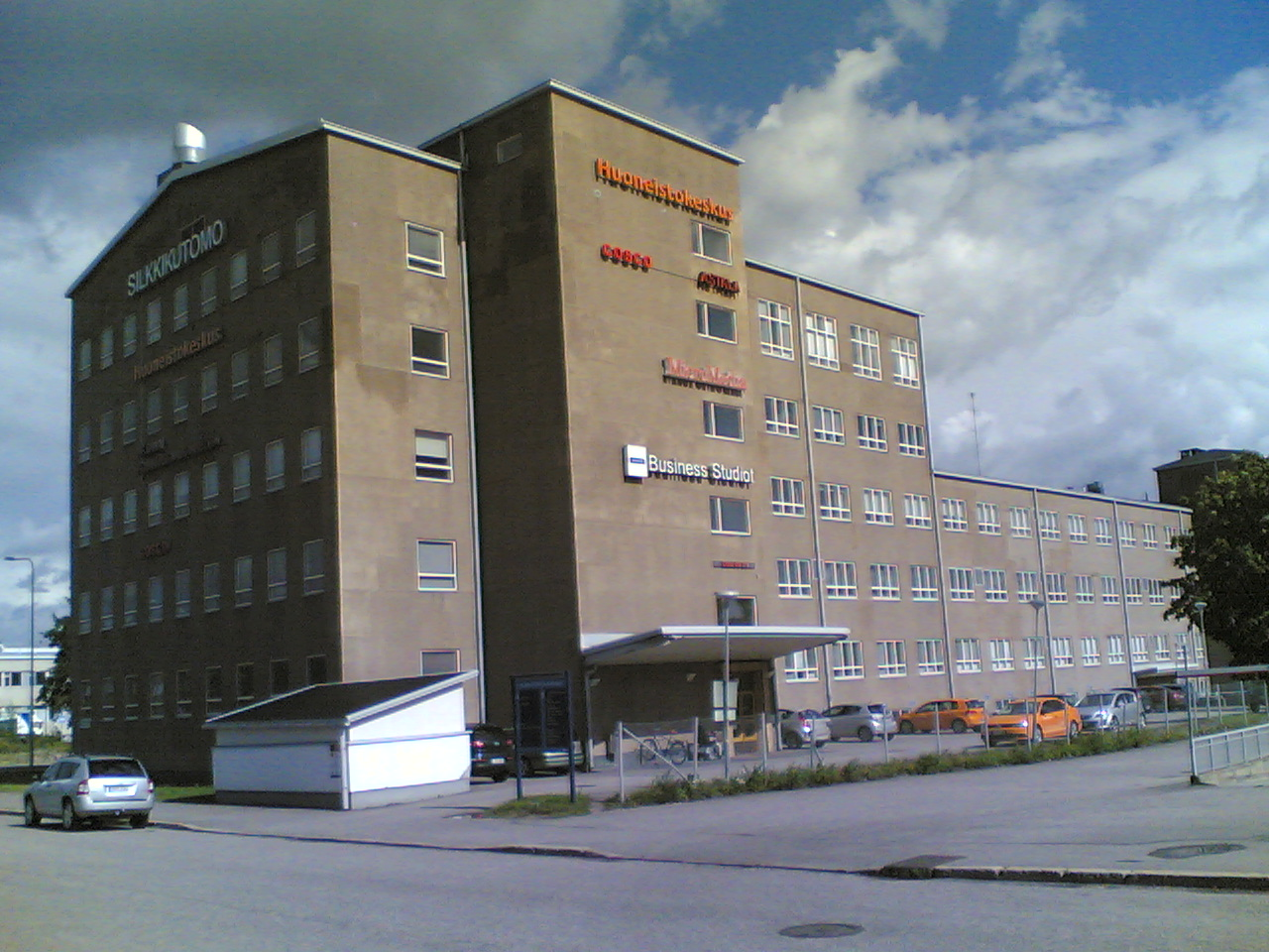 Laivalahdenkatu 2